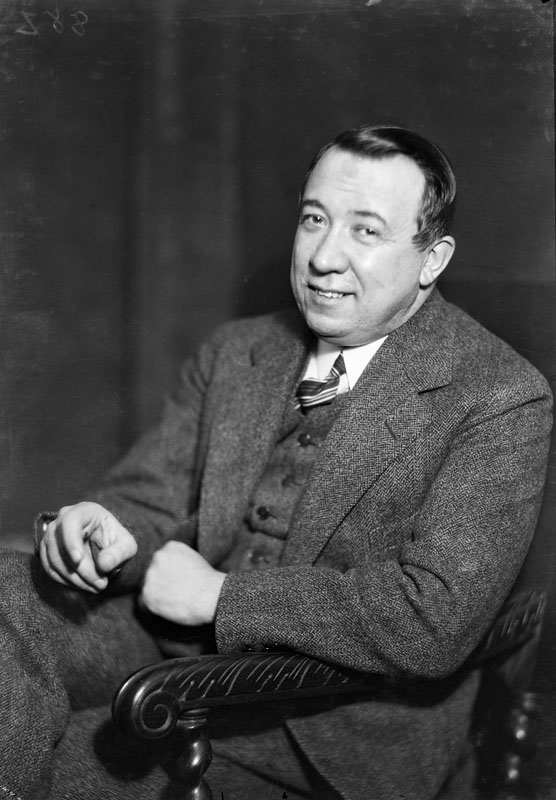 Porträtt av författaren och konstkritikern Gotthard Johansson